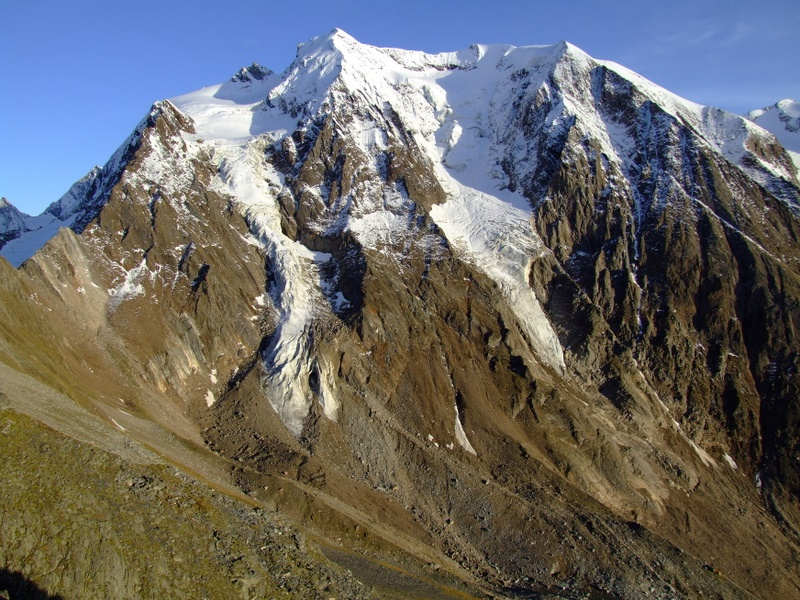 Jedne z najwyższych szczytów Alp Zillertalskich - od lewej: Hochfernspitze 3463 i Hintere Weisspitze 3431